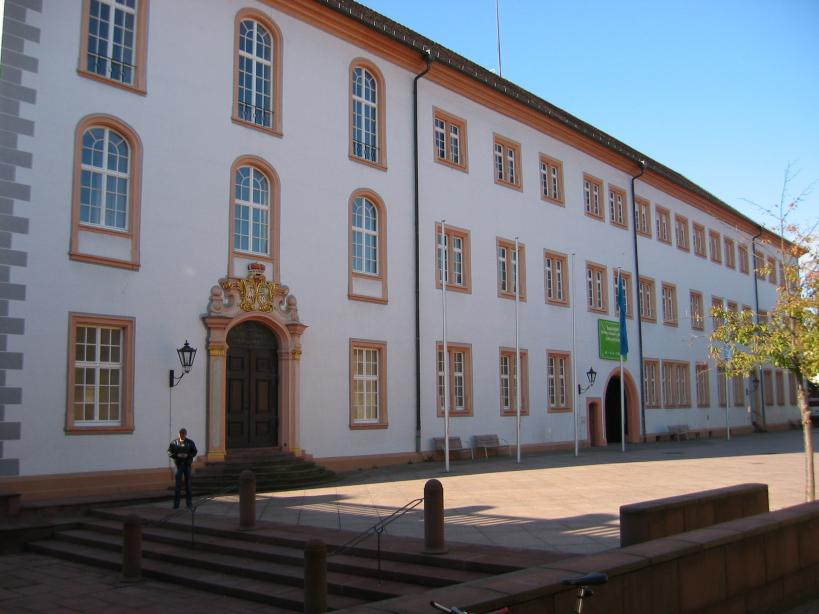 Ettlinger Schloß, Ansicht der Hauptfront